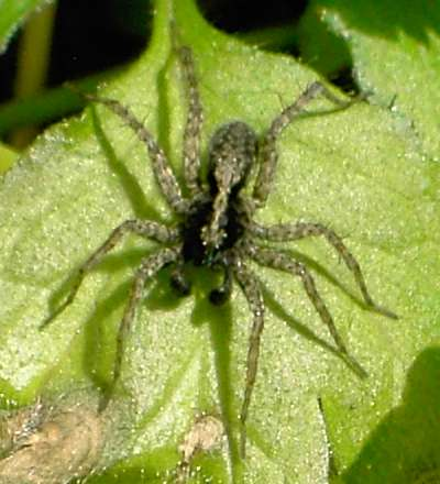 Jagtedderkop (ukendt art).